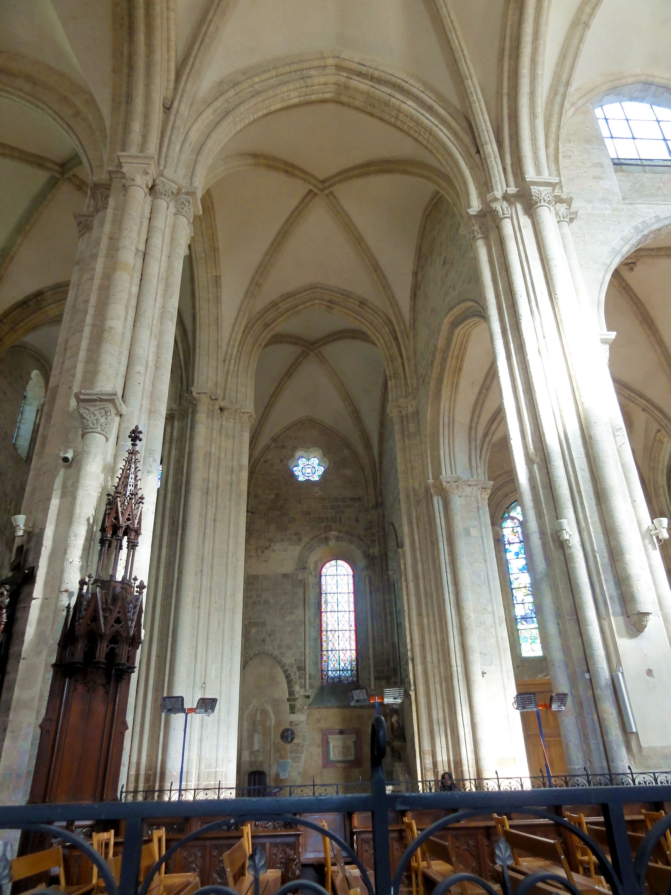 Chœur, 1ère travée, vue vers le nord.